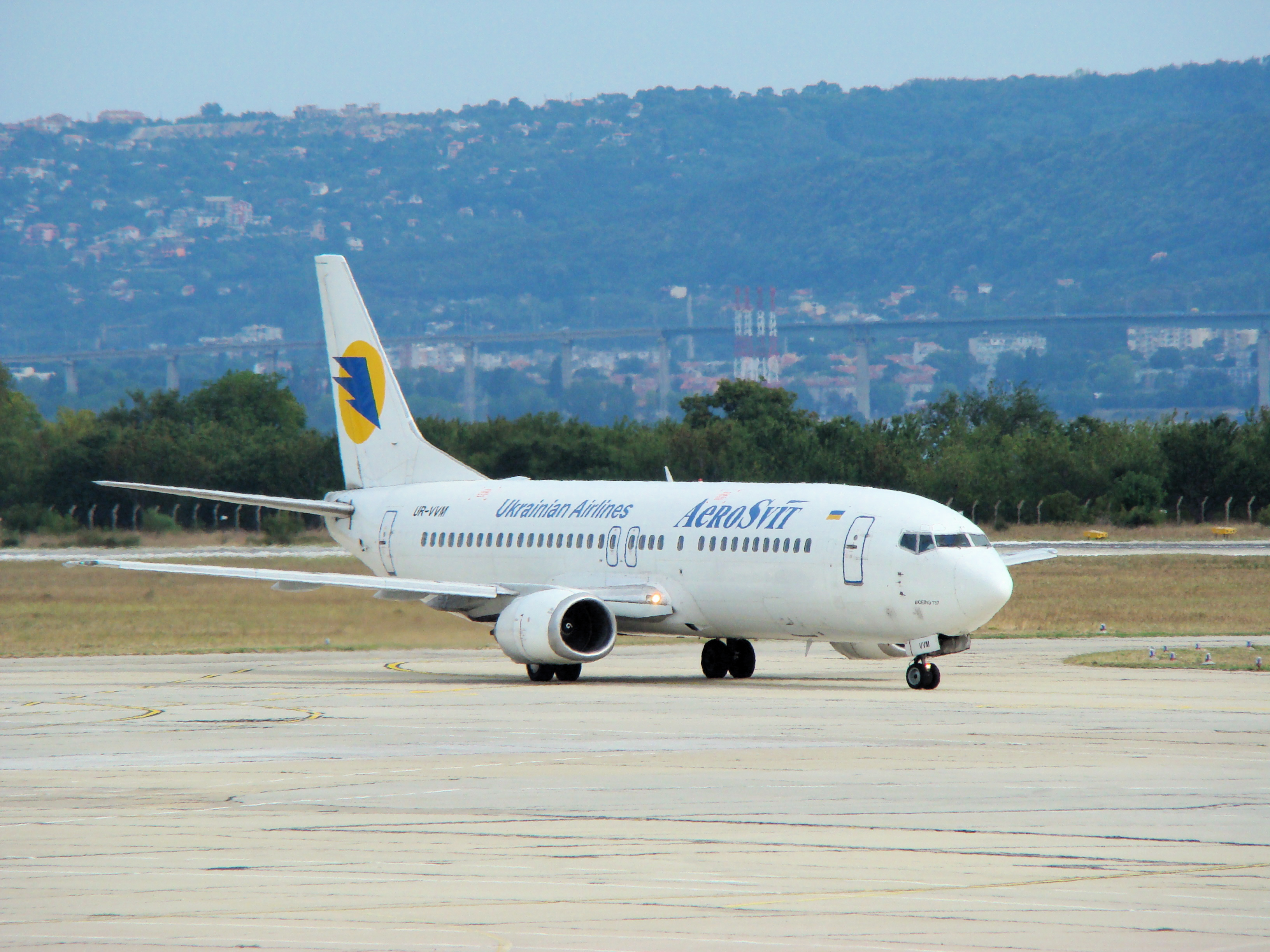 UR-VVM Боинг 737 в международном аэропорту Варна